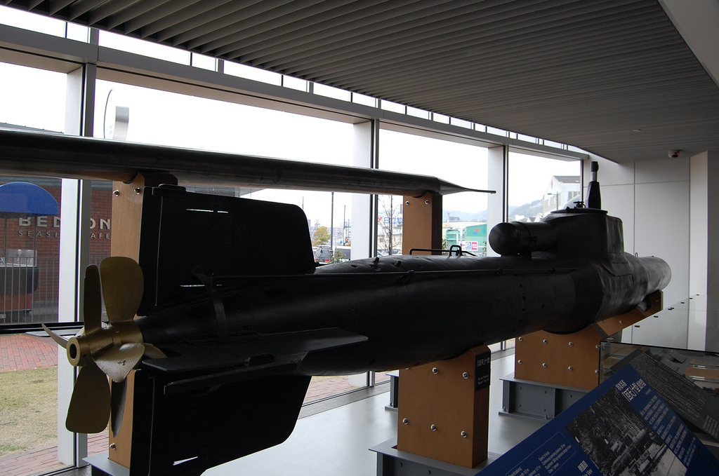 Kaiten Type 10